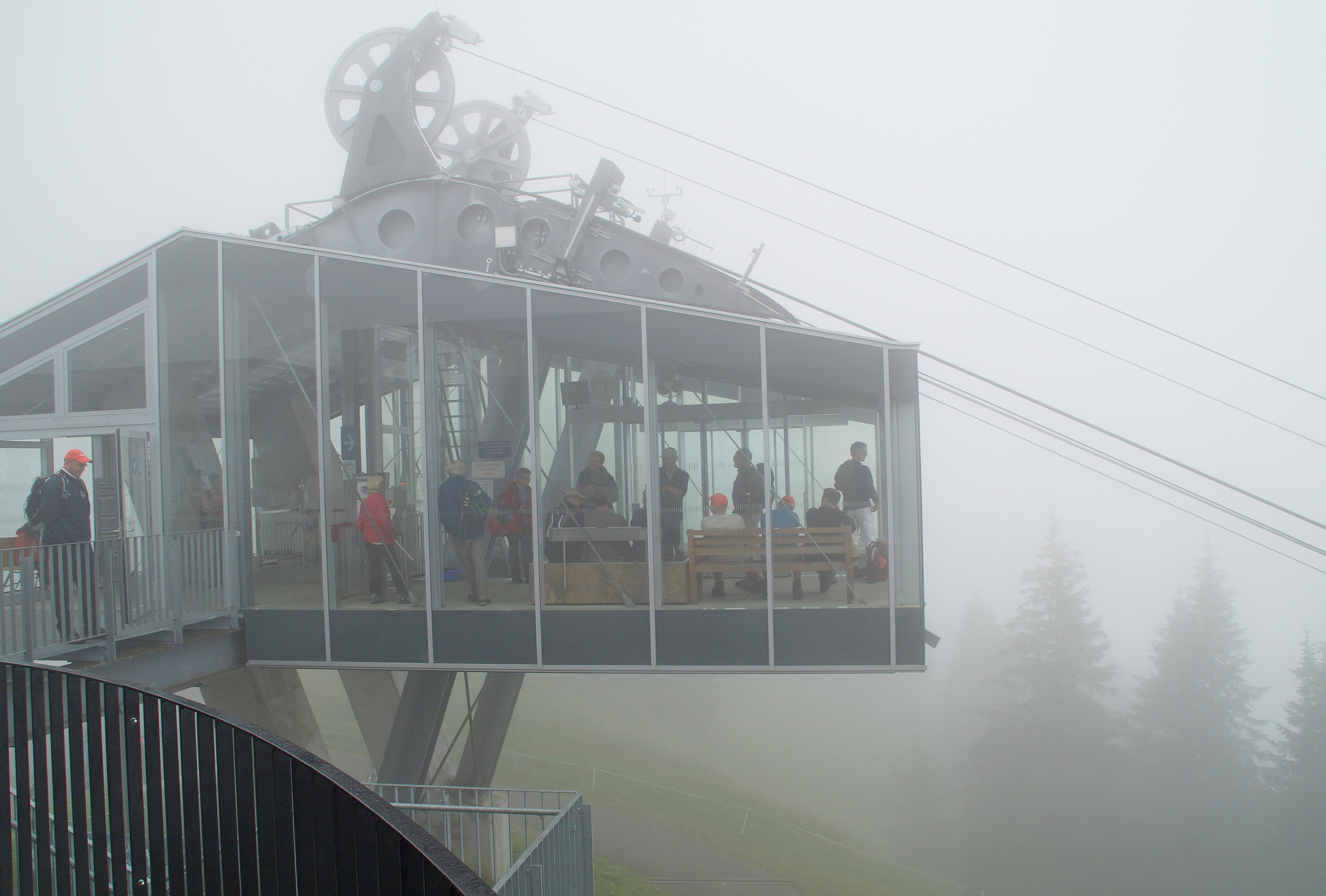 Bezauer Seilbahn, Bergstation im Nebel